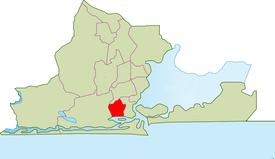 Mapa de Ajeromi-Ifelodun, Lagos